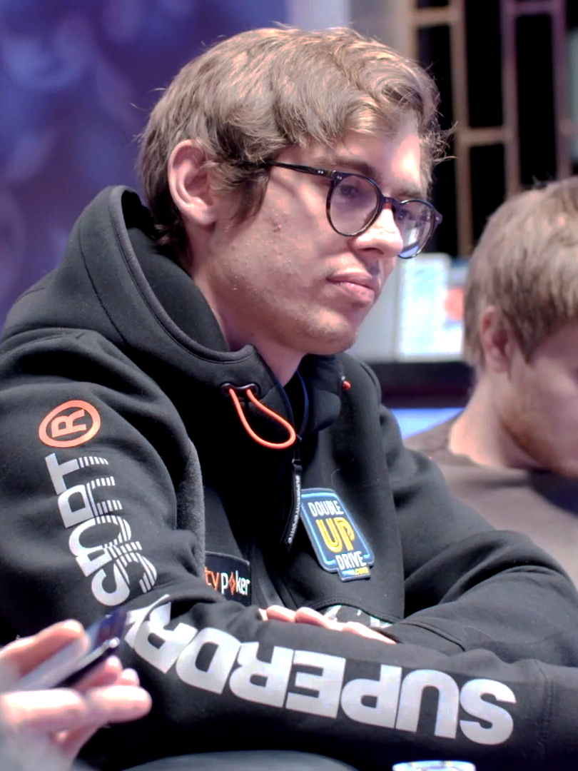 Fedor Holz beim Super High Roller Bowl V